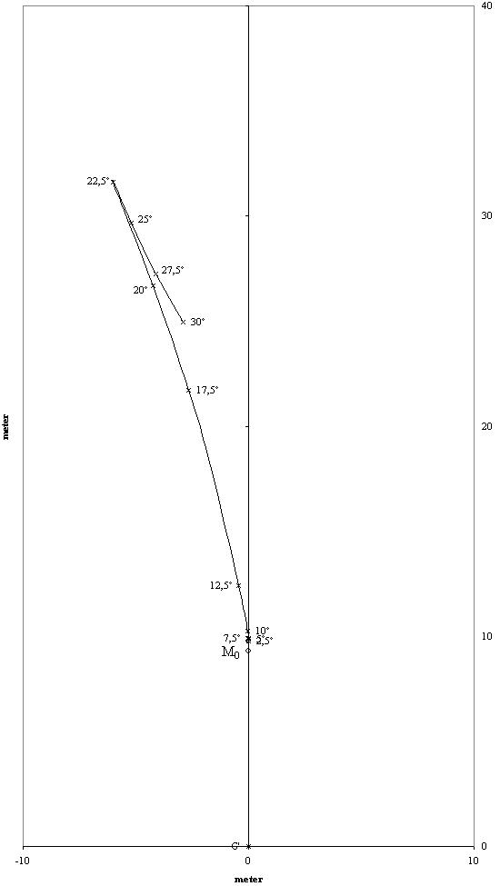 Eigen ontwerp.